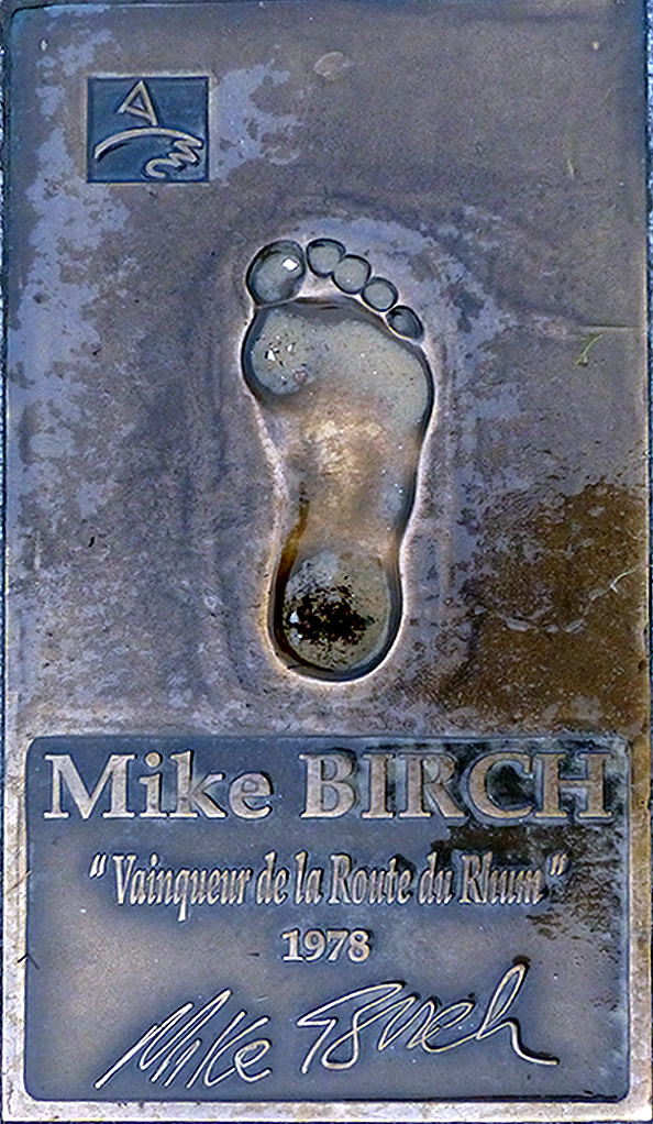 Empreinte de pied de Mike Birch, sur le jetée Thiers à Arcachon. Moulage de plomb, mise en oeuvre par Jacques Aulonié.